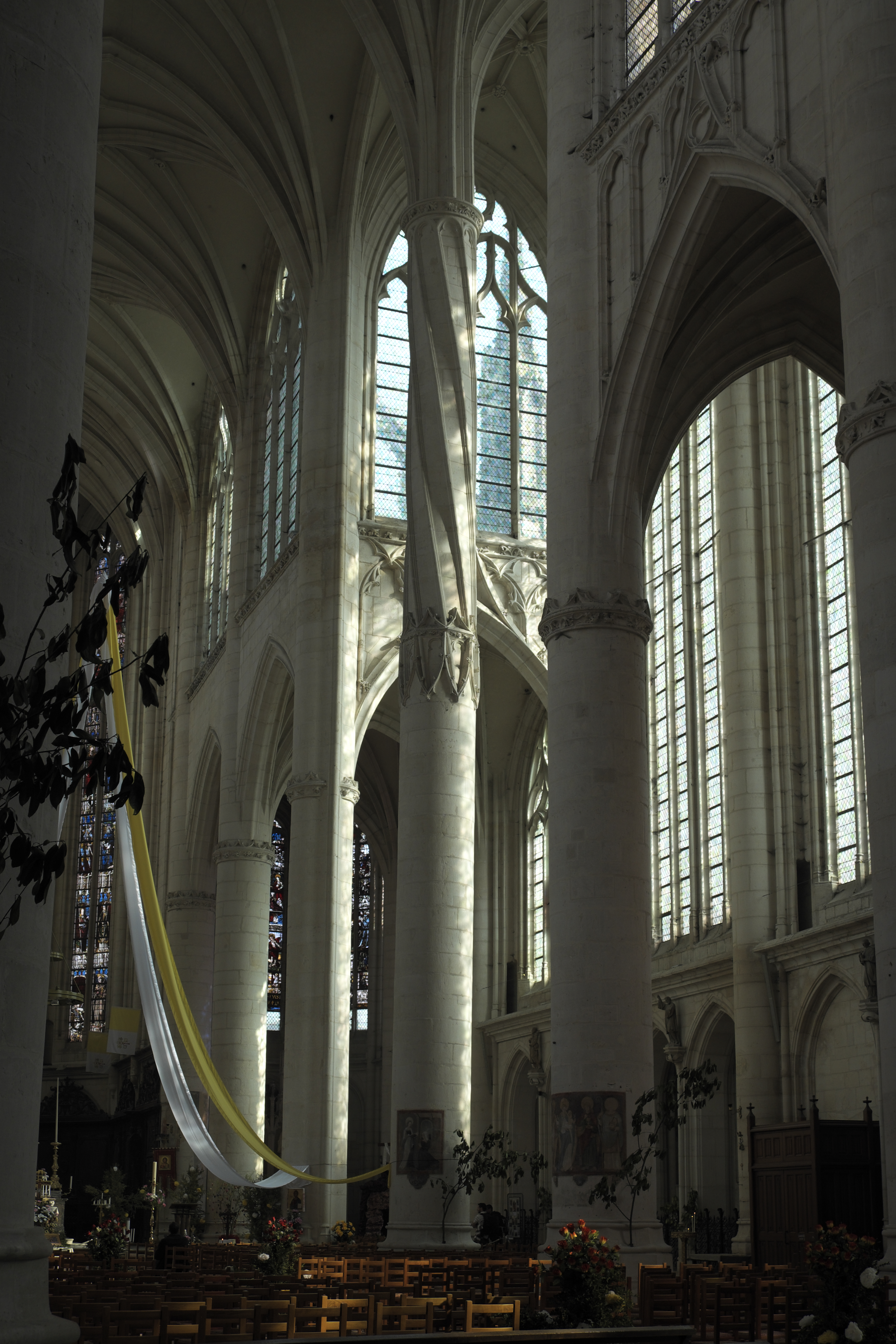 Basilika Saint-Nicolas in Saint-Nicolas-de-Port im Département Meurthe-et-Moselle (Lothringen/Frankreich), Innenraum